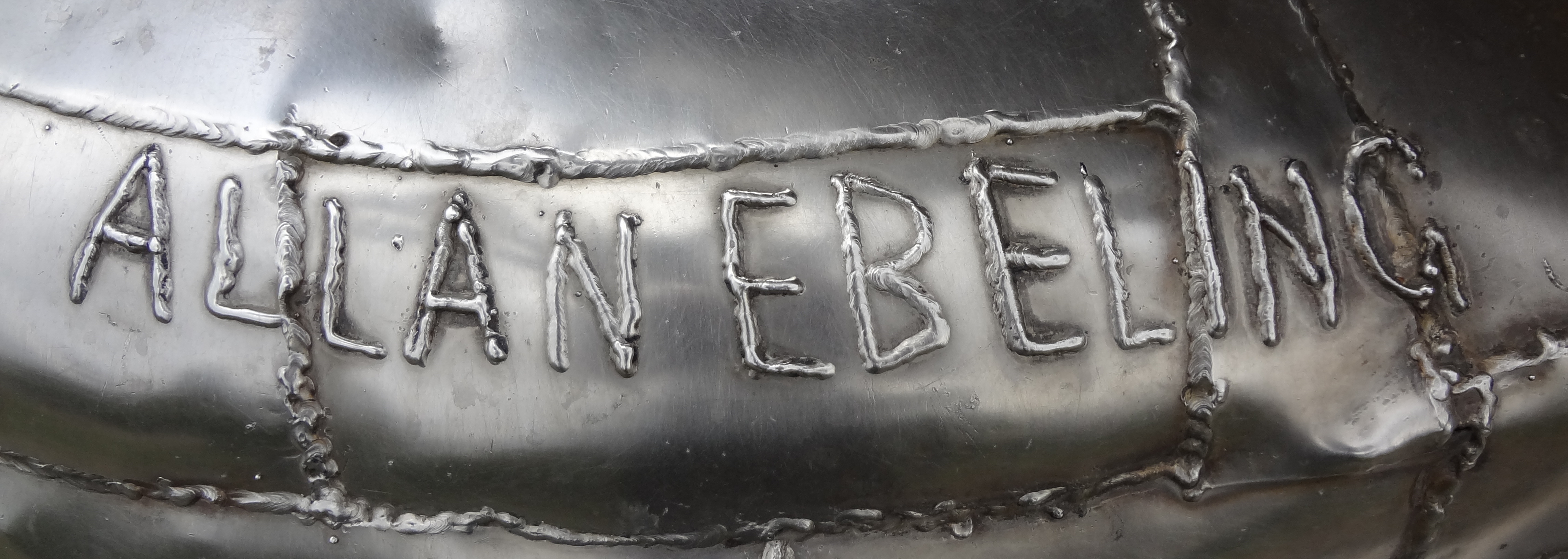 Allan Ebelings signatur i plåt på verket Harlekin